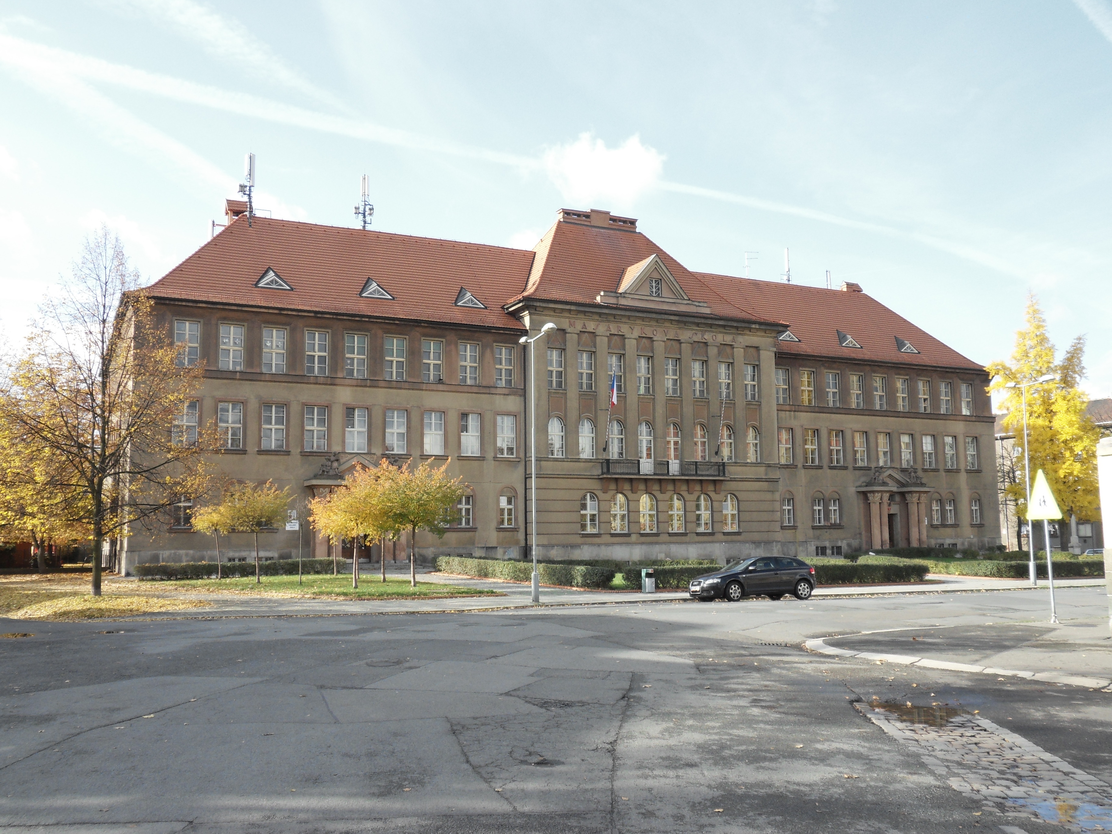 Masarykova základní škola, Plzeň 2-Východní Předměstí, Jiráskovo náměstí 878/10, Habrmannova 878/15, Klášterní 878/4, Plzeň.